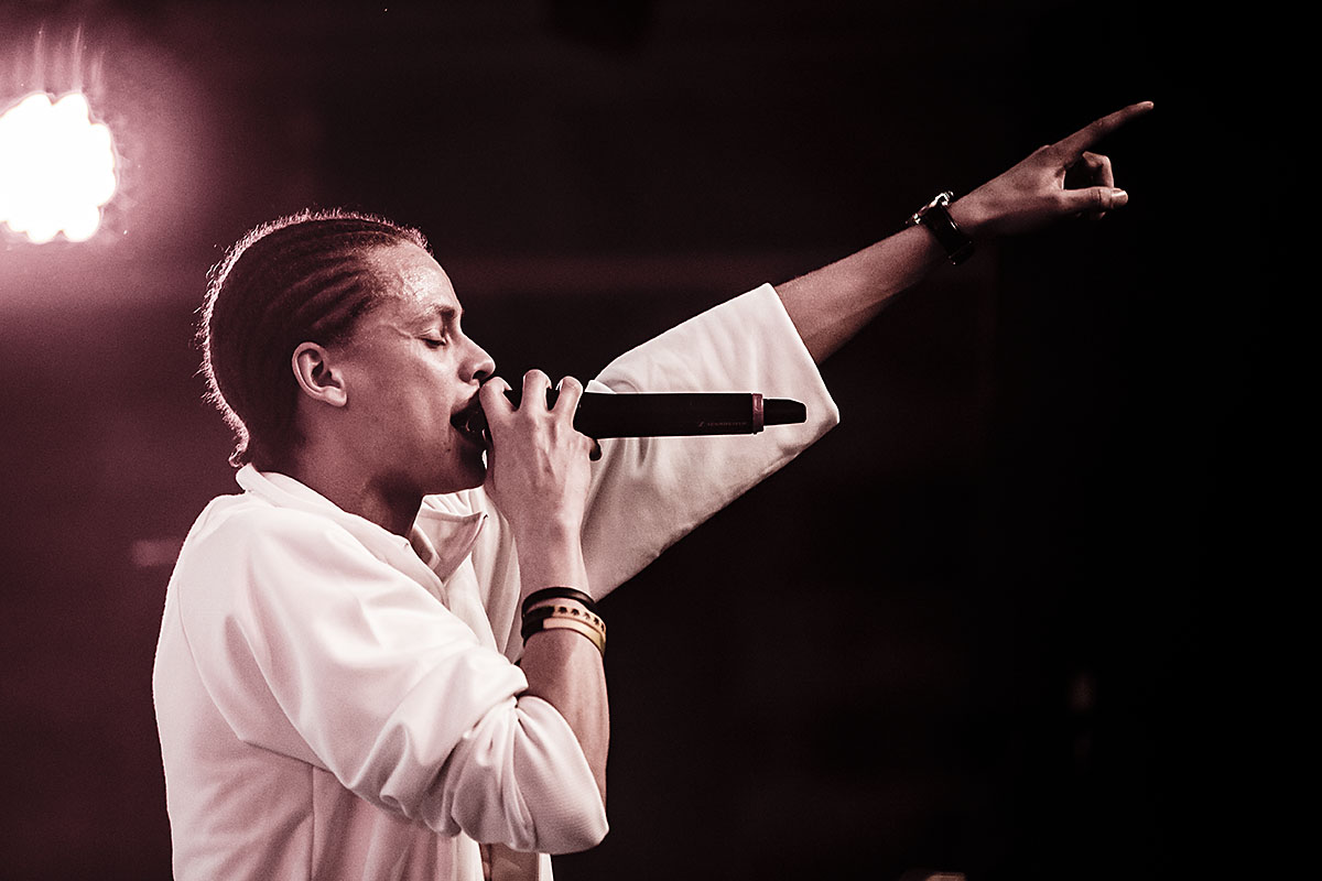 Little Kaka til Copenhagen Dancehall 5/4-14